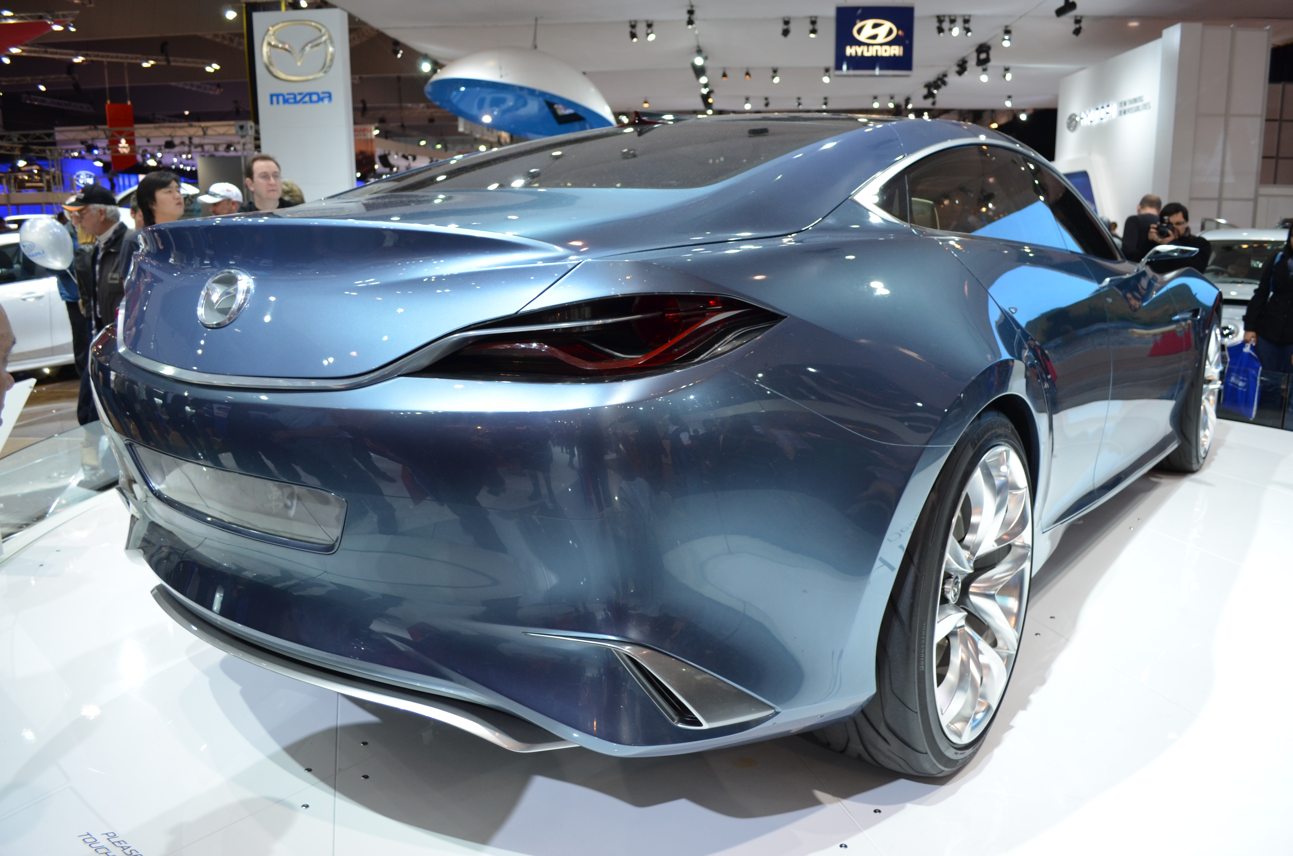 20110709_D5100 (310)